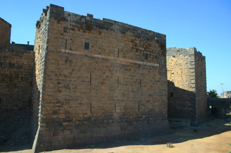 Zitadelle von Bosra, eigenes Bild von 2006 public domain Kategorie:Polarlys-Test